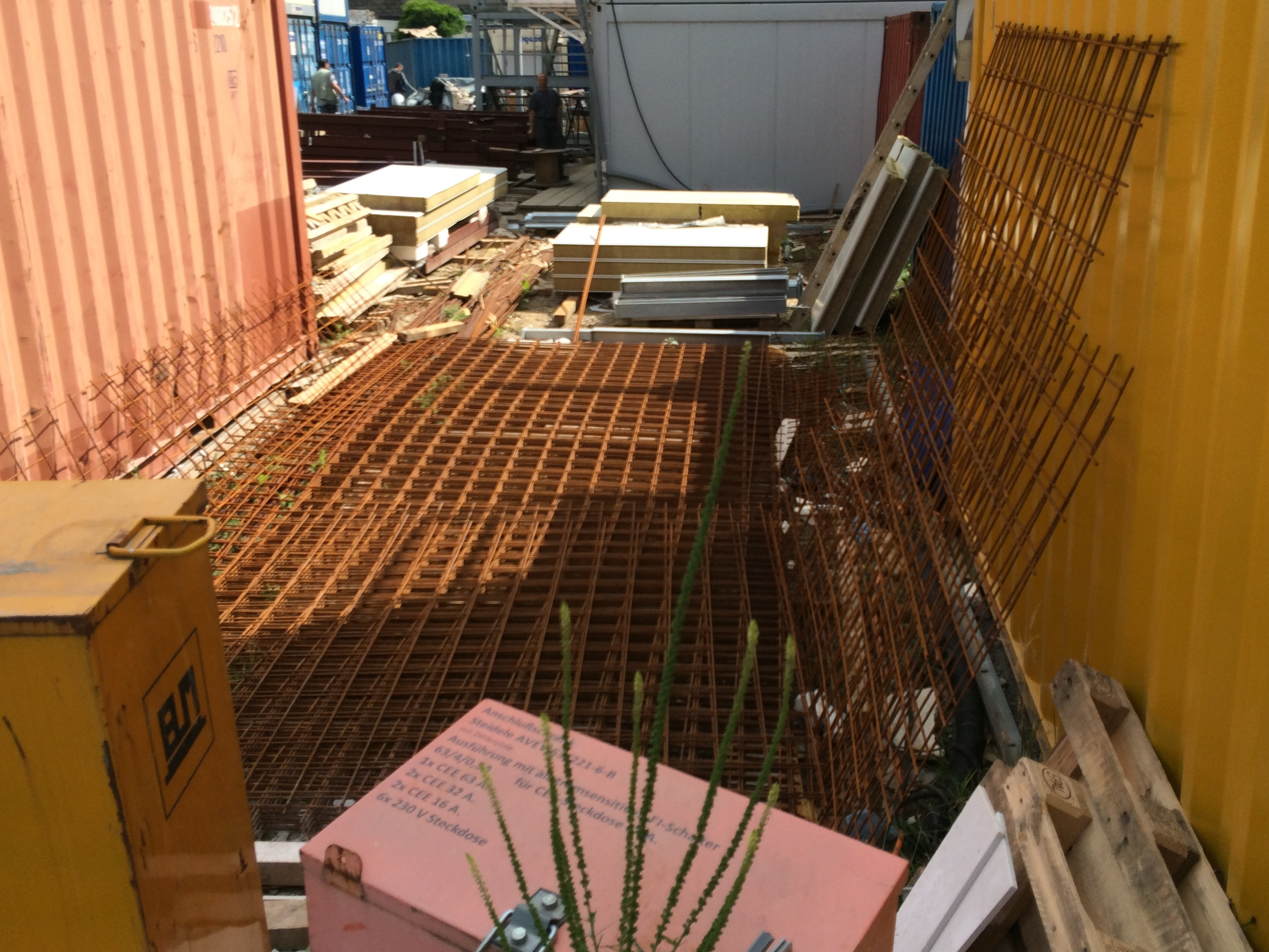 Betonstahlmatten Baustelle Marien Hospital Herne